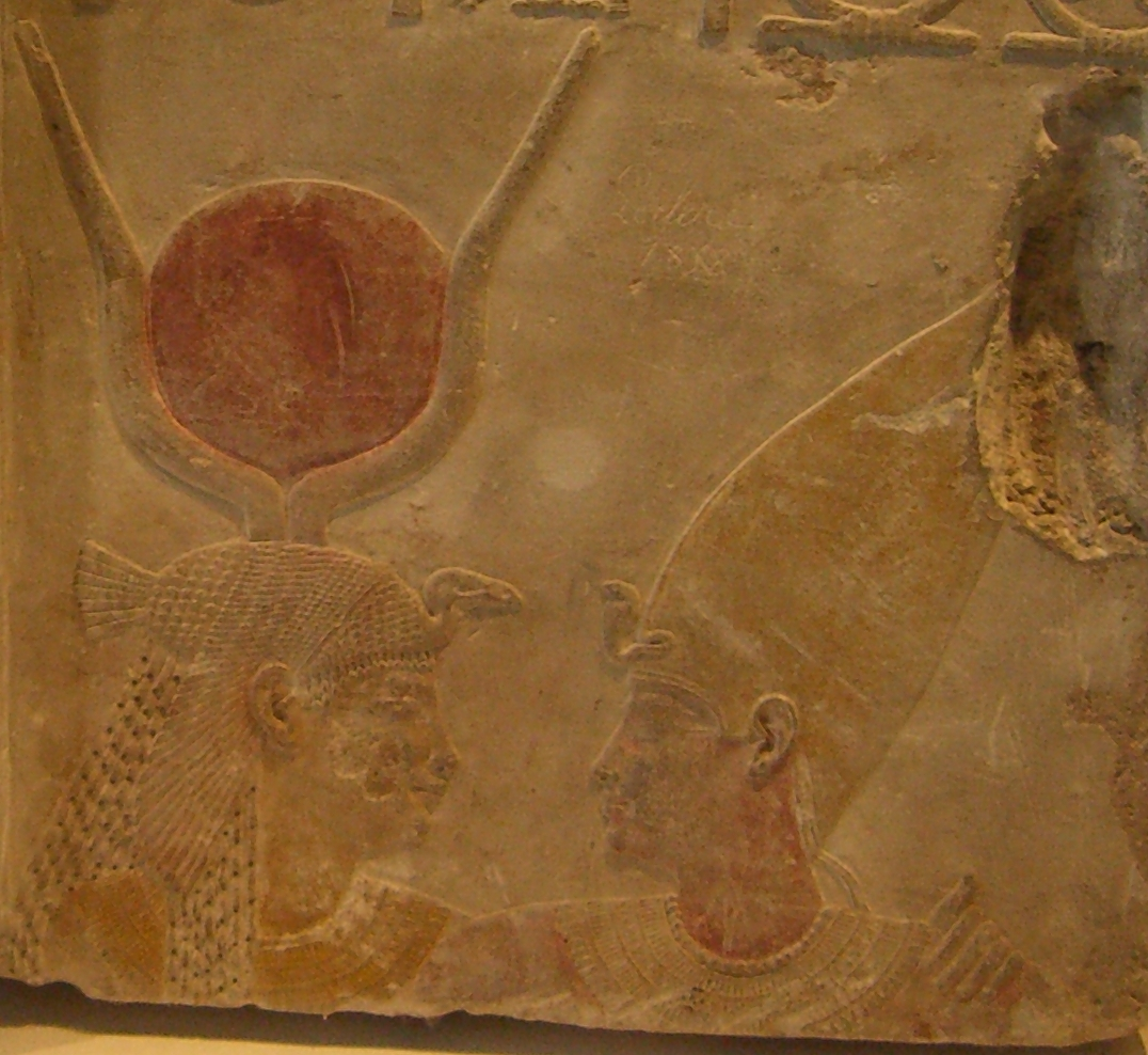 Relief provenant de Saqqarah, représentant la déesse Isis et le pharaon Nectanébo II - XXXe dynastie - Musée du Louvre